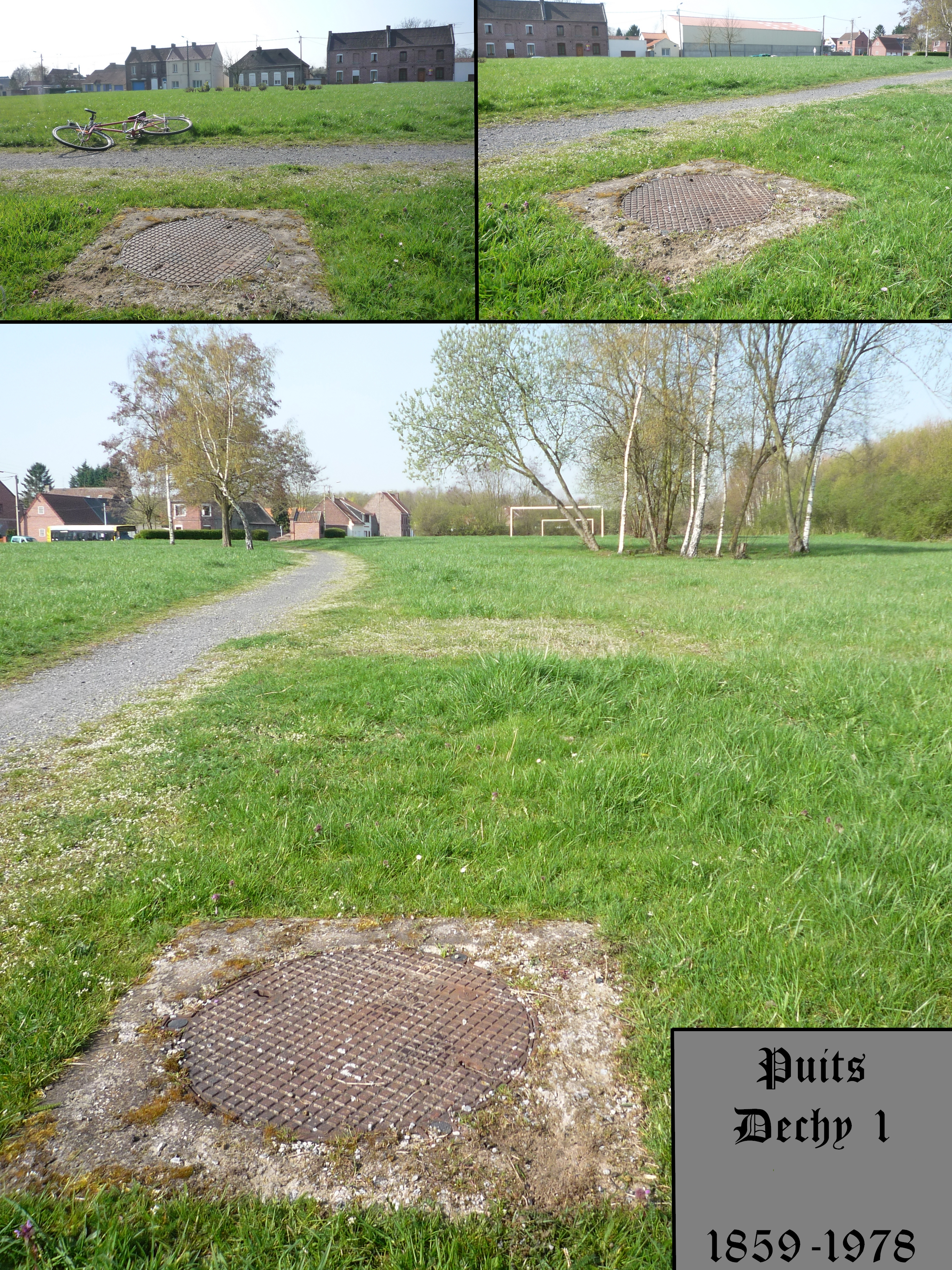 La Fosse Dechy de la Compagnie des mines d'Aniche était un charbonnage constitué de deux puits situé à Dechy, Nord, Nord-Pas-de-Calais, France.